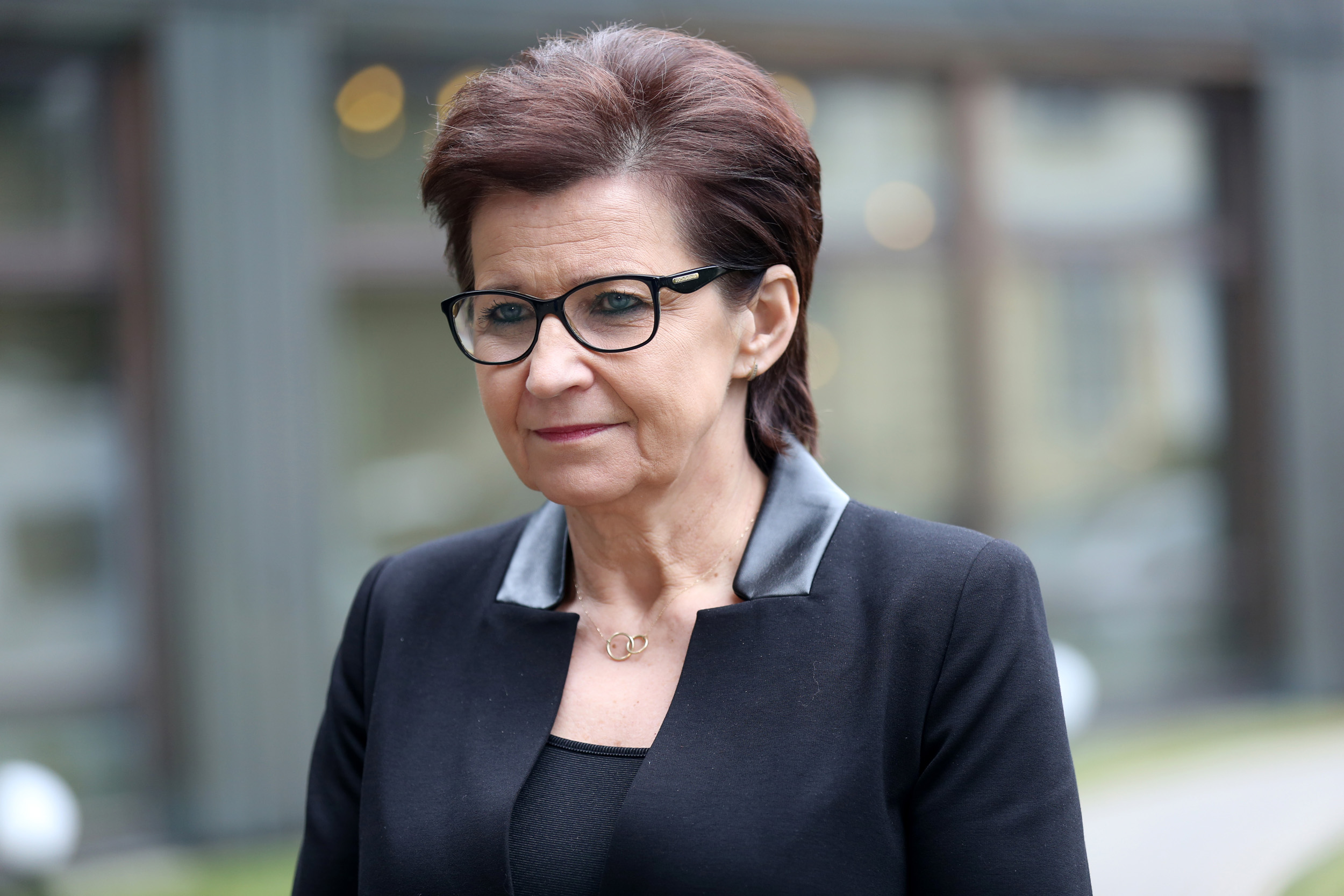 Anna Wasilewska